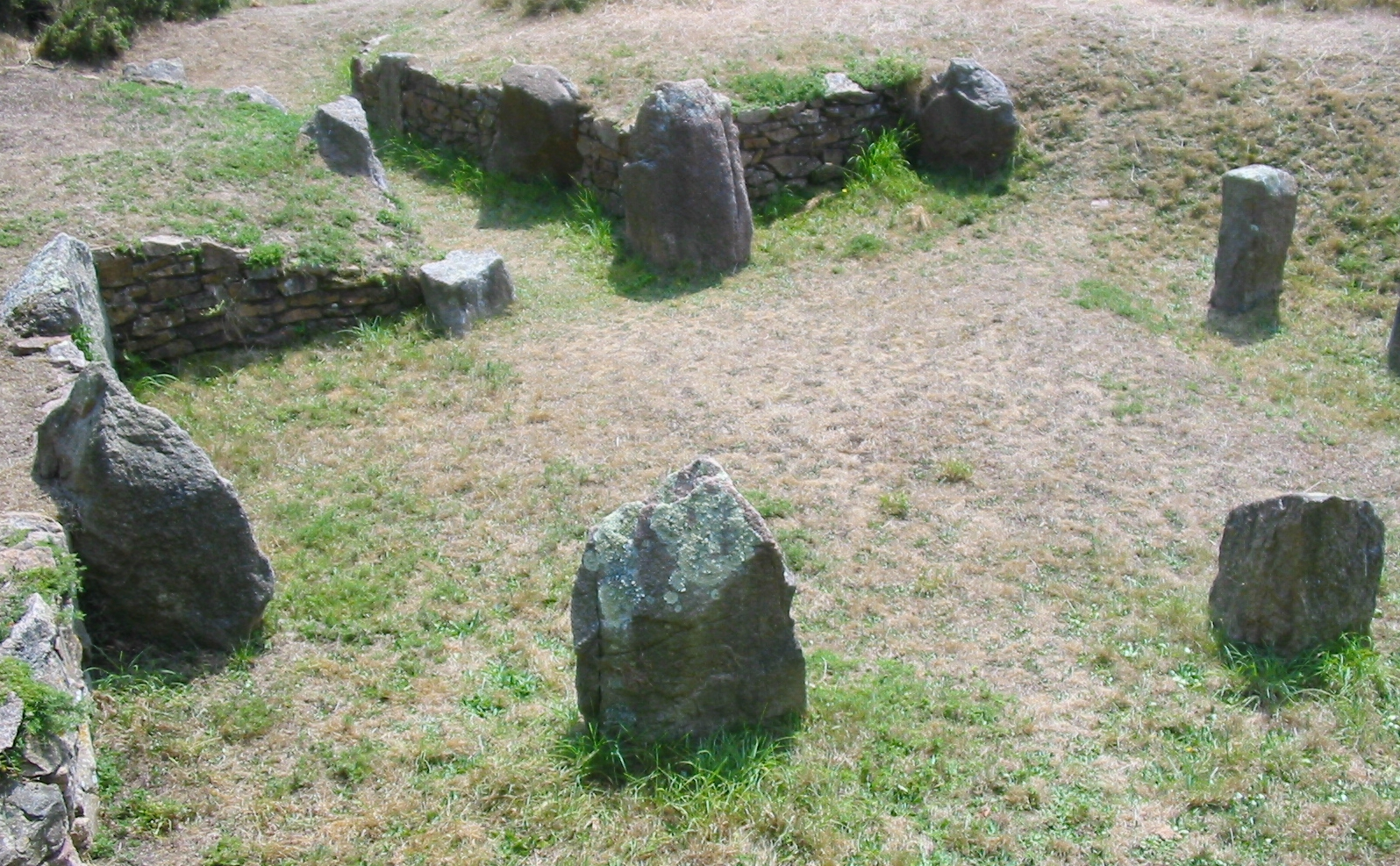 Dolmen des Géonnais, prehistoric site (partially restored), St Ouen, Jersey